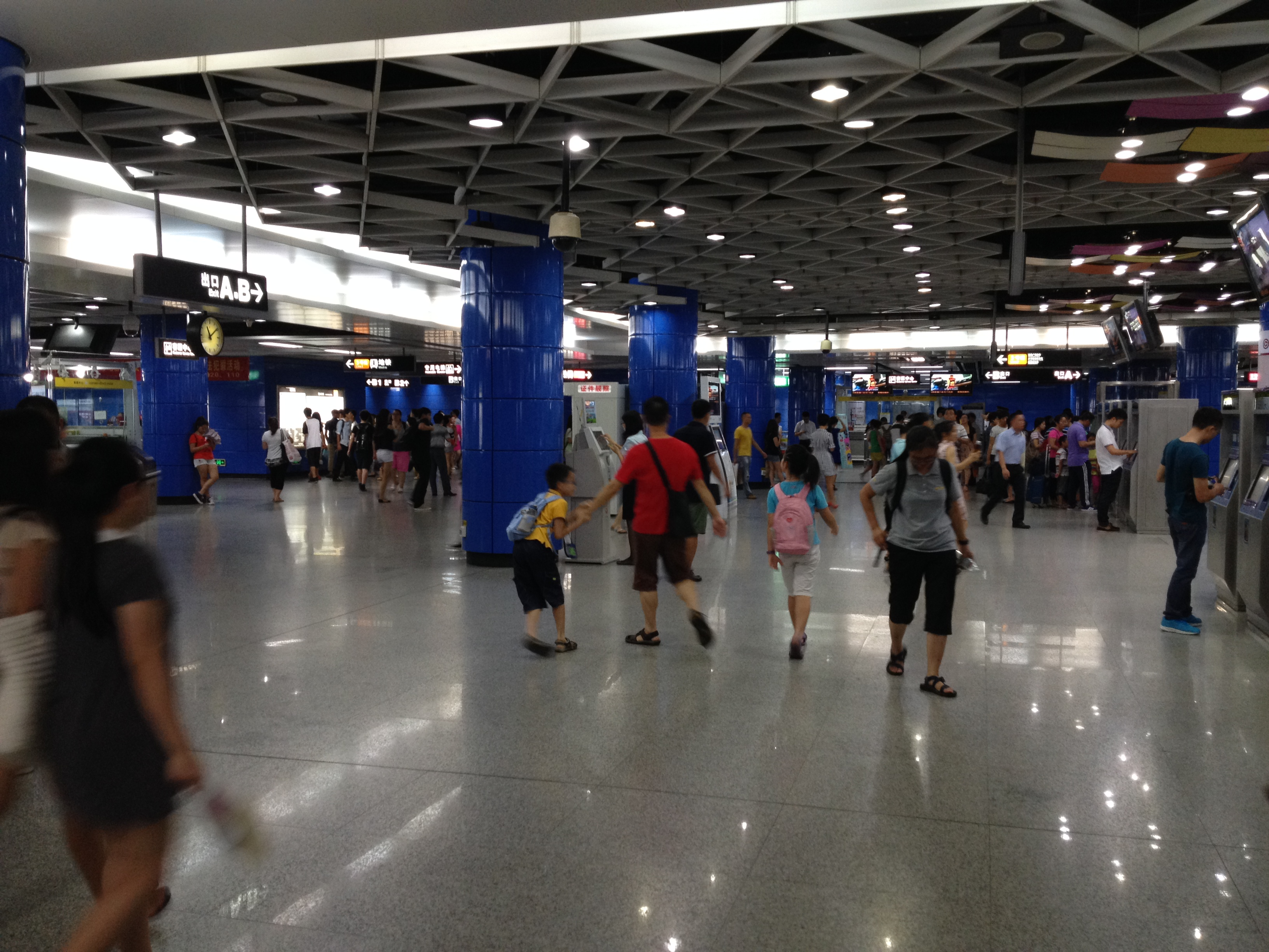 广州地铁珠江新城站大堂